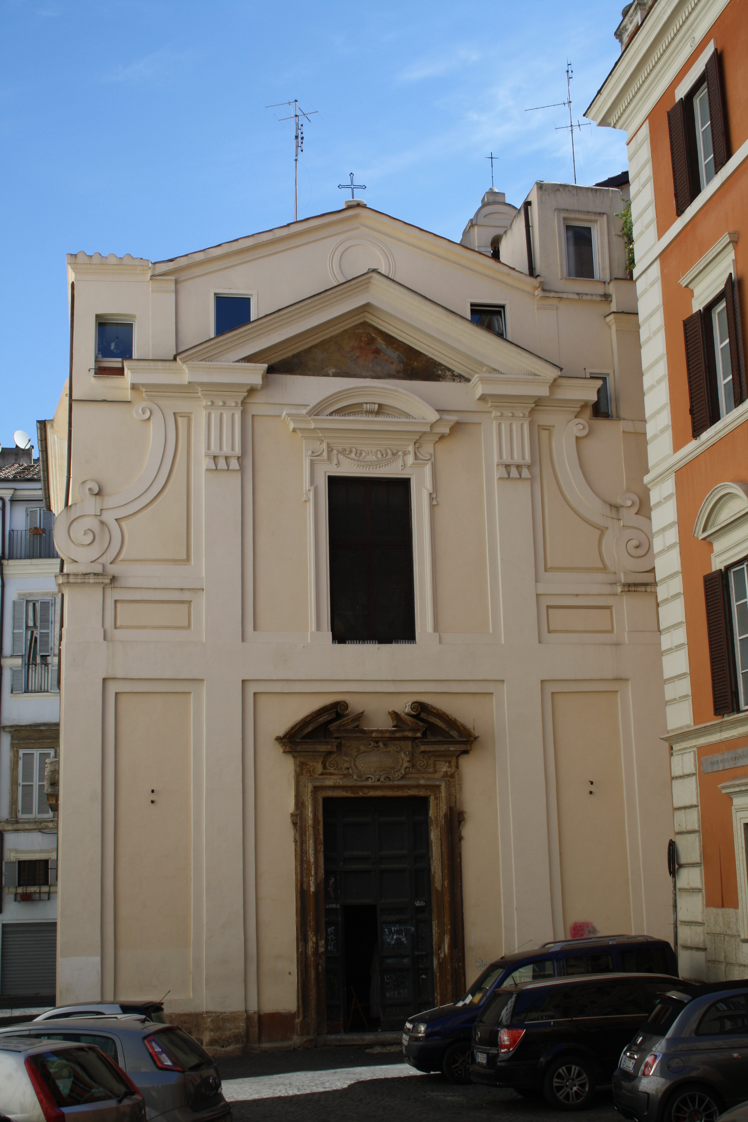 Chiesa di San Salvatore in Campo, Roma